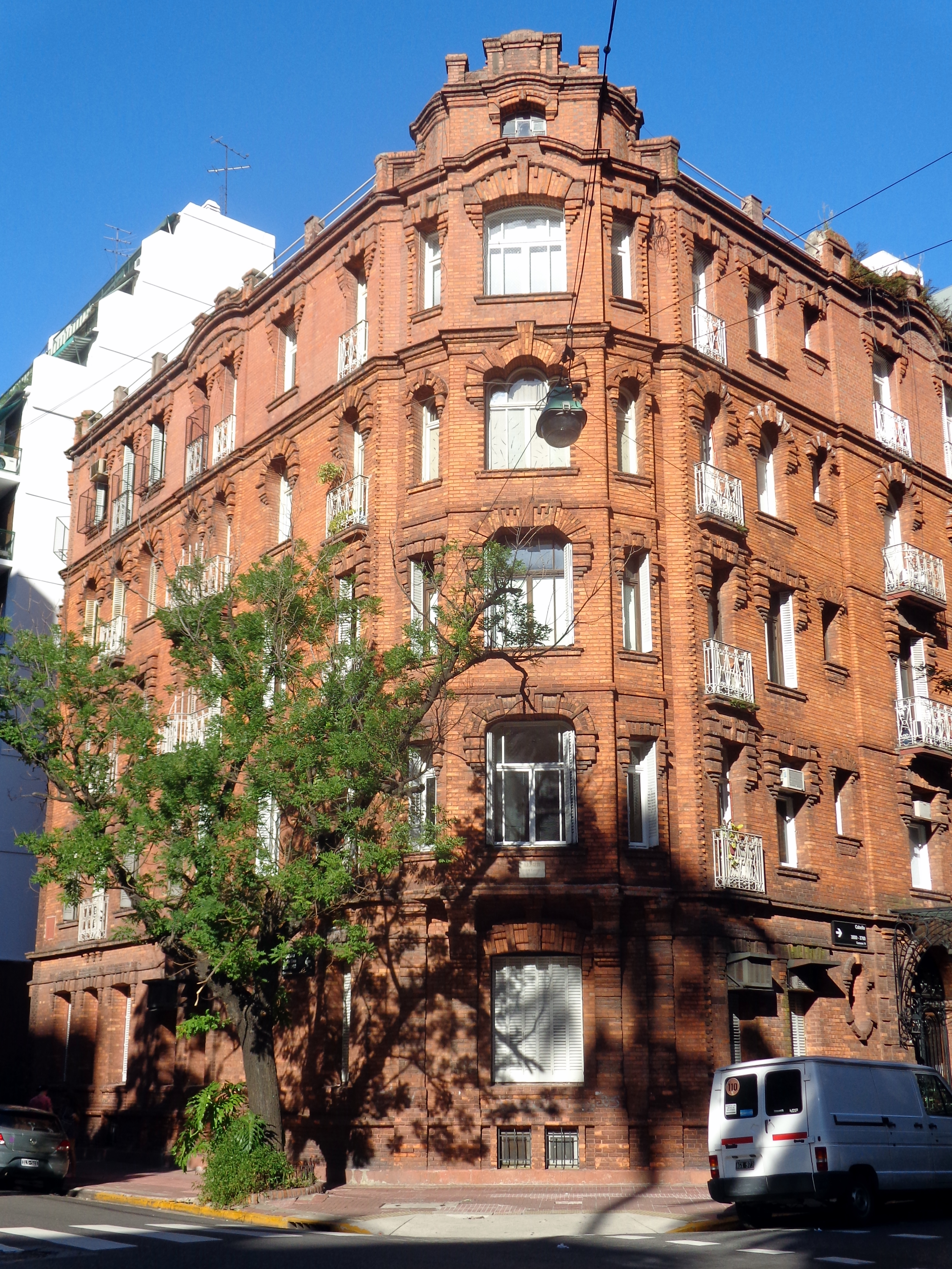 Fue proyectado y construido por el ingeniero-arquitecto británico Regis Pigeon en 1911. Se encuentra en la esquina del 3791 de la calle Cabello (con prolongación sobre la calle República Arabe Siria), barrio de Palermo, Buenos Aires, Argentina.